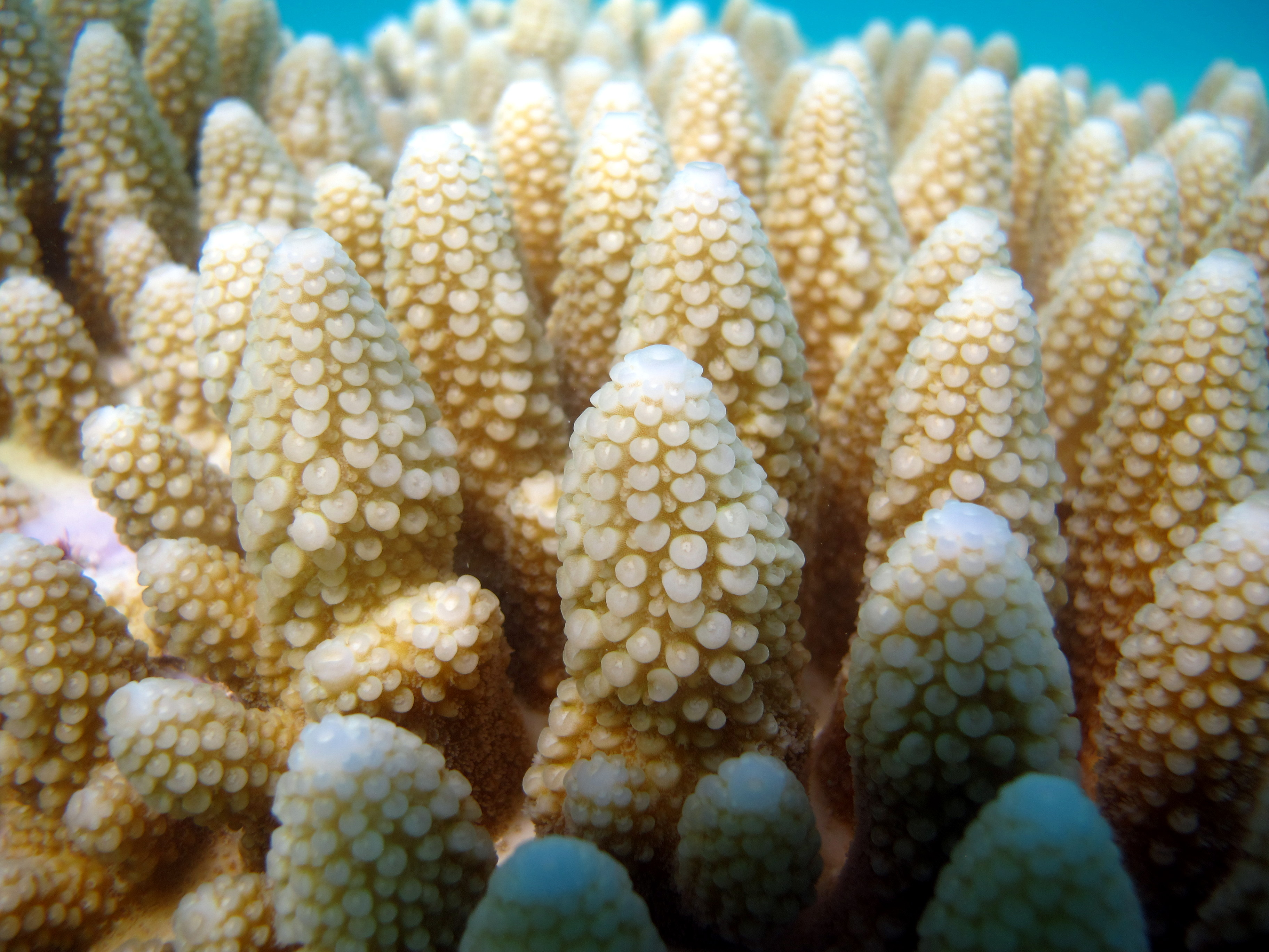 Gros plan sur du corail Acropora gemmifera aux Maldives (atoll de Baa).